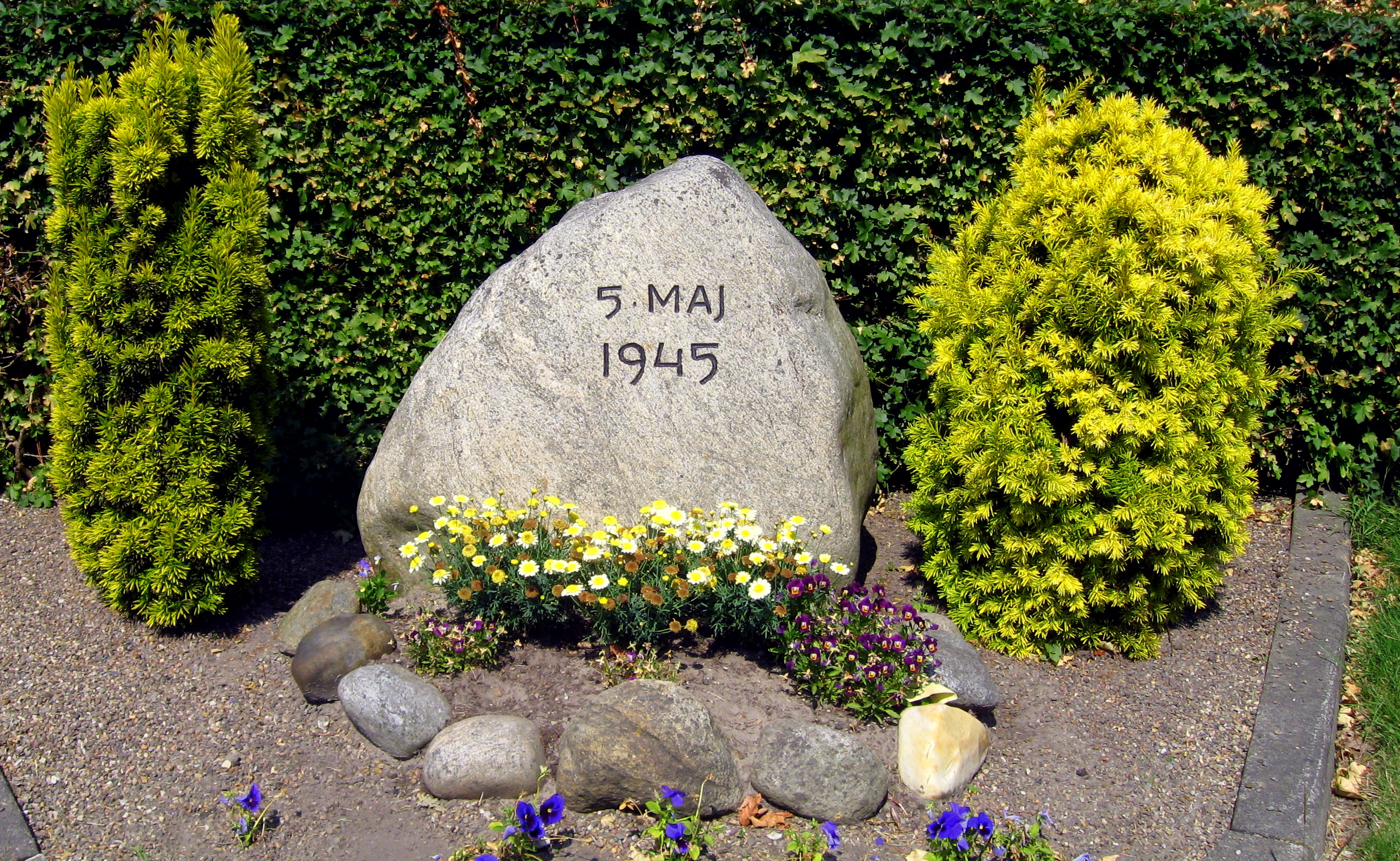 Mindesten for Danmarks befrielse 5. maj 1945